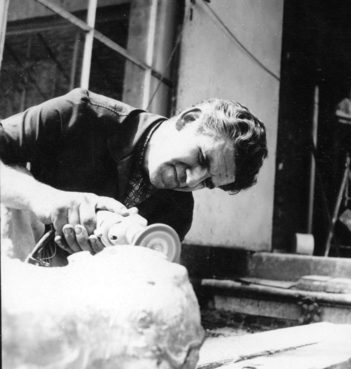 Bart Welten aan het werk aan St. Joost kunstacademie.